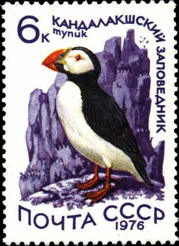 Марка. Тупик. Кандалакшский заповедник 1976